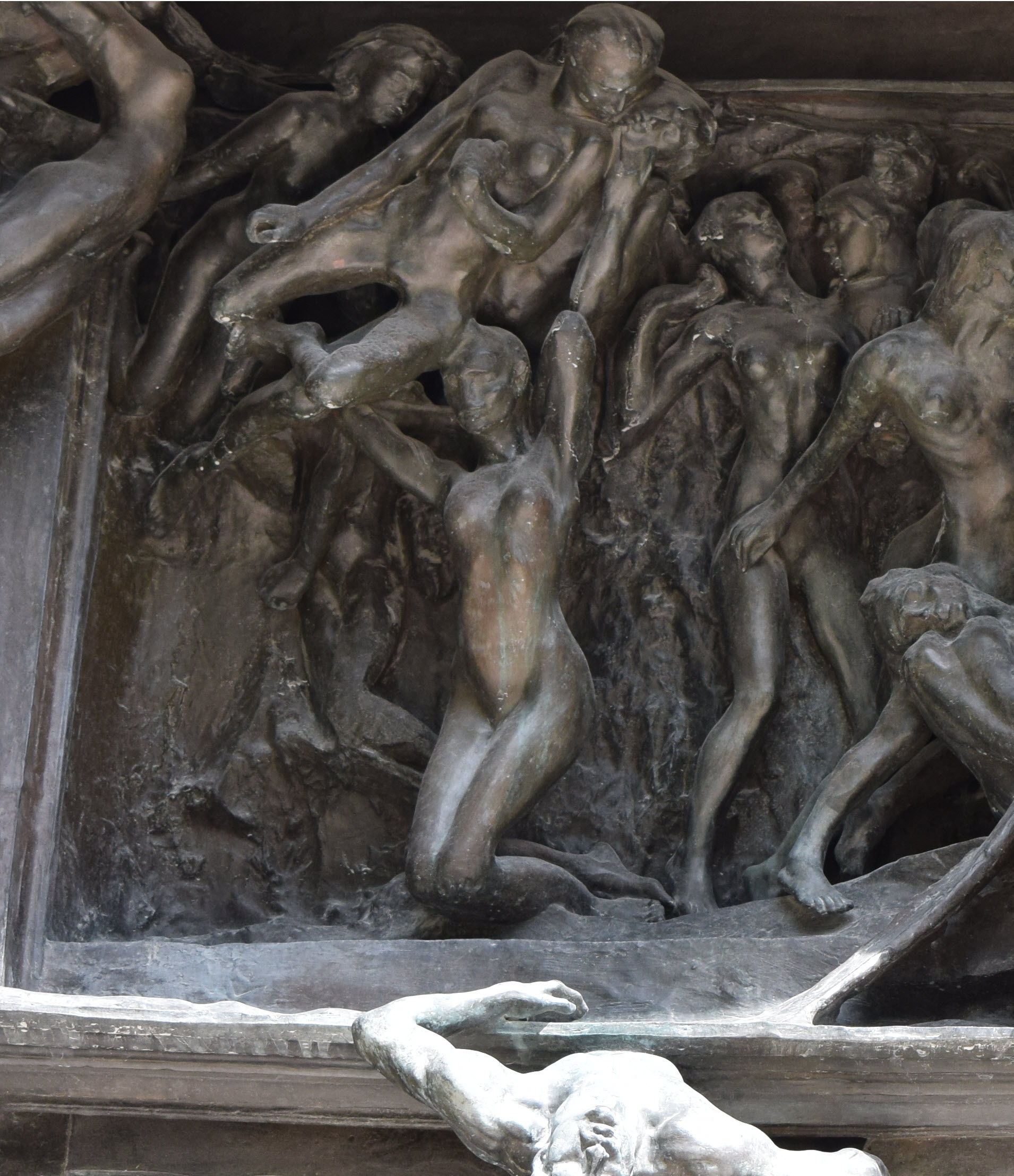 Auguste Rodin. La Porte de l'Enfer (Détail de la Faunesse á Genoux) . Jardin du musée Rodin.